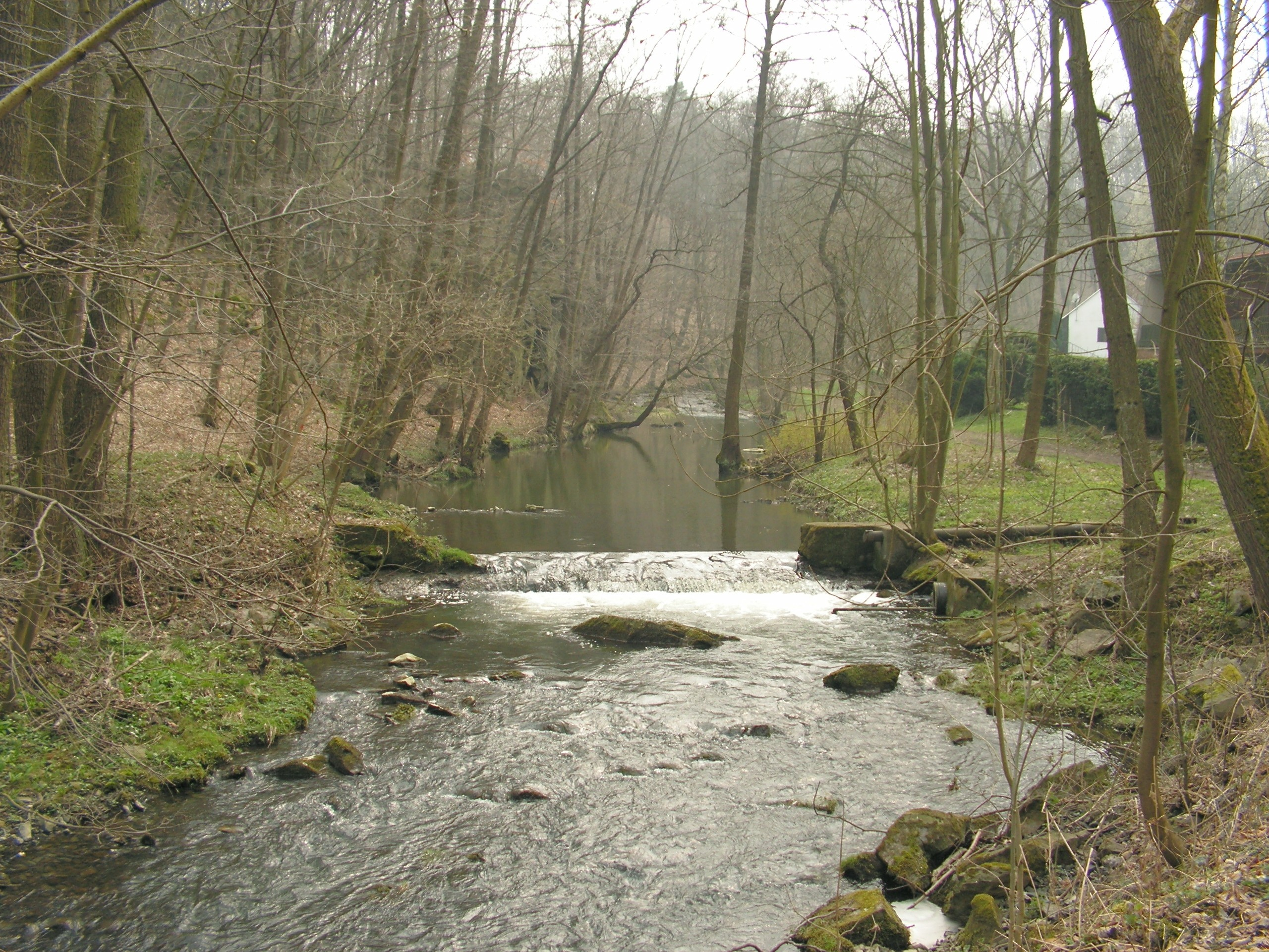 Říčka Vrchlice nedaleko Kutné Hory.